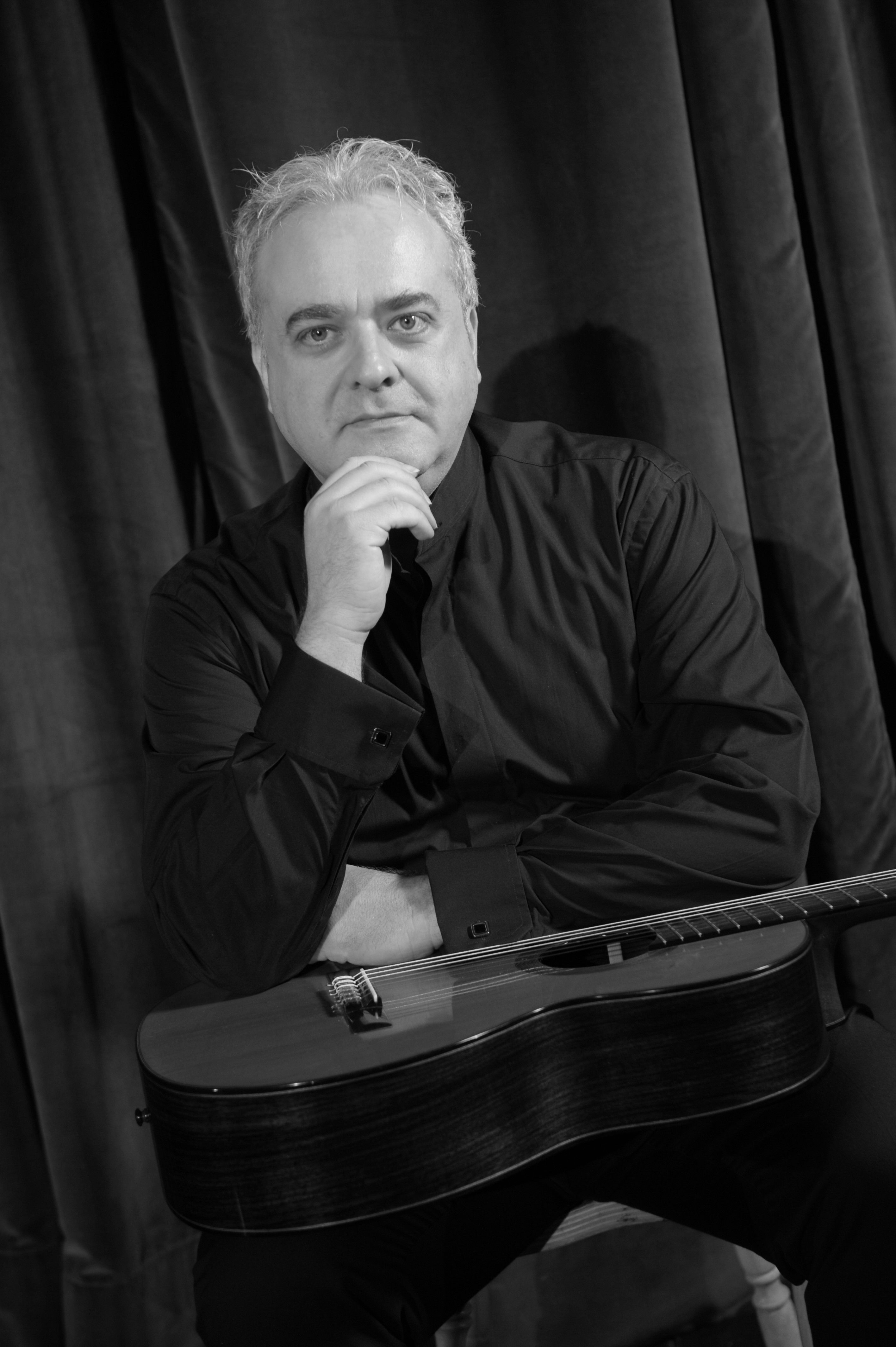 Photo